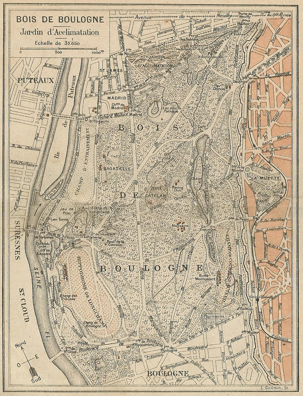 Paris (France) ; carte du Bois de Boulogne entre 1905 (1ère édition du guide) et 1921.